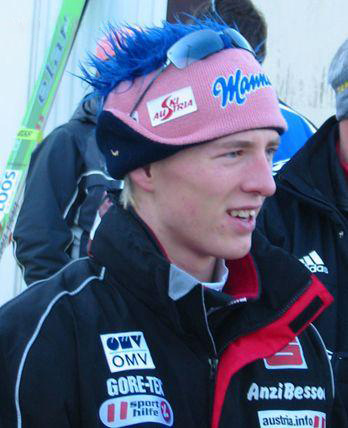 Christian Nagiller - austriacki skoczek narciarski podczas Pucharu Świata w skokach narciarskich Zakopane 2003.